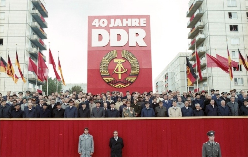 Title: Berlin, 40. Jahrestag DDR-Gründung, Ehrengäste People in the image: Honecker, Erich: Staatsratsvorsitzender, Generalsekretär des ZK der SED, DDR (GND 118553399) Stoph, Willi: Ministerpräsident, Staatsratsvorsitzender, Armeegeneral, SED, DDR Keßler, Heinz: Minister für Verteidigung, Armeegeneral, DDR (GND 119196719) Sindermann, Horst: Volkskammerpräsident, stellvertretender Staatsratsvorsitzender, DDR Eberlein, Werner: Sekretär der Bezirksleitung Magdeburg der SED, DDR Jaruzelski, Wojciech: Staatspräsident, General, Polen Ceausescu, Nicolae: Präsident, Staatsratsvorsitzender, Generalsekretär des ZK der KP, Rumänien Gorbatschow, Michail: Präsident, Vorsitzender des Obersten Sowjets, Friedensnobelpreisträger, Sowjetunion Jakeš, Miloš: Generalsekretär der Kommunistischen Partei der Tschechoslowakei Gorbatschowa, Raissa: Ehefrau von Michail Gorbatschow Factual corrections and alternative descriptions are encouraged separately from the original description. Additionally errors can be reported at this page to inform the Bundesarchiv. Original historic description: Berlin: 40. Jahrestag DDR/ Parade/ Eine Ehrenparade der Nationalen Volksarmee leitete die Feierlichkeiten am 7.Oktober ein. Auf der Ehrentribüne in der Karl-Marx-Allee wurden herzlich begrüßt der Generalsekretär des ZK der SED und Vorsitzende des Staatsrates der DDR, Erich Honecker, und weitere Mitglieder der Partei- und Staatsführung der DDR sowie der Generalsekretär des ZK der KPdSU und Vorsitzende des Obersten Sowjets der UdSSR, Michail Gorbatschow (7.v.l.), und weitere Repräsentanten aus dem Ausland.